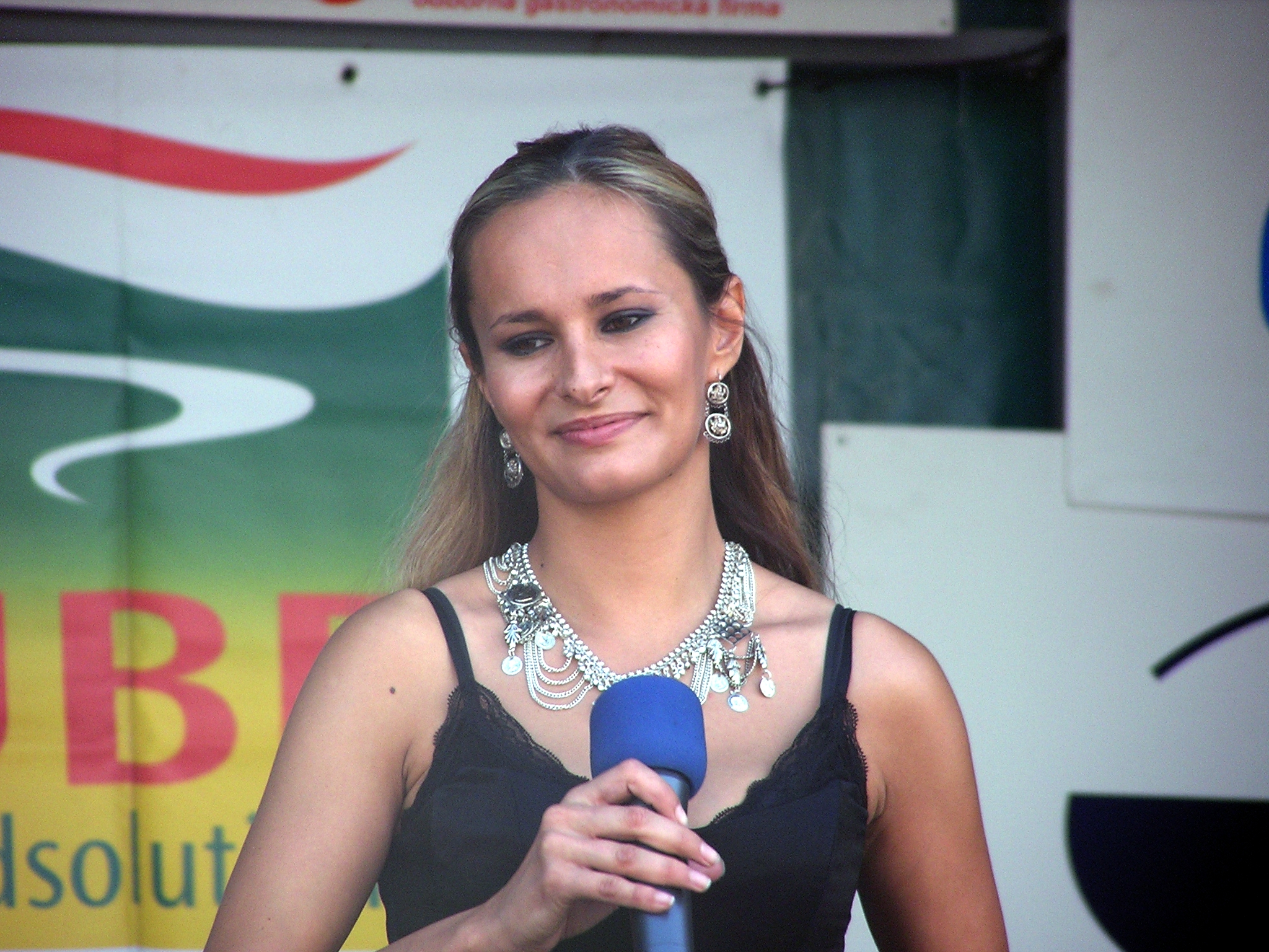 Monika Absolonová, vystoupení na slavnostech sv. Vavřince, Kladno